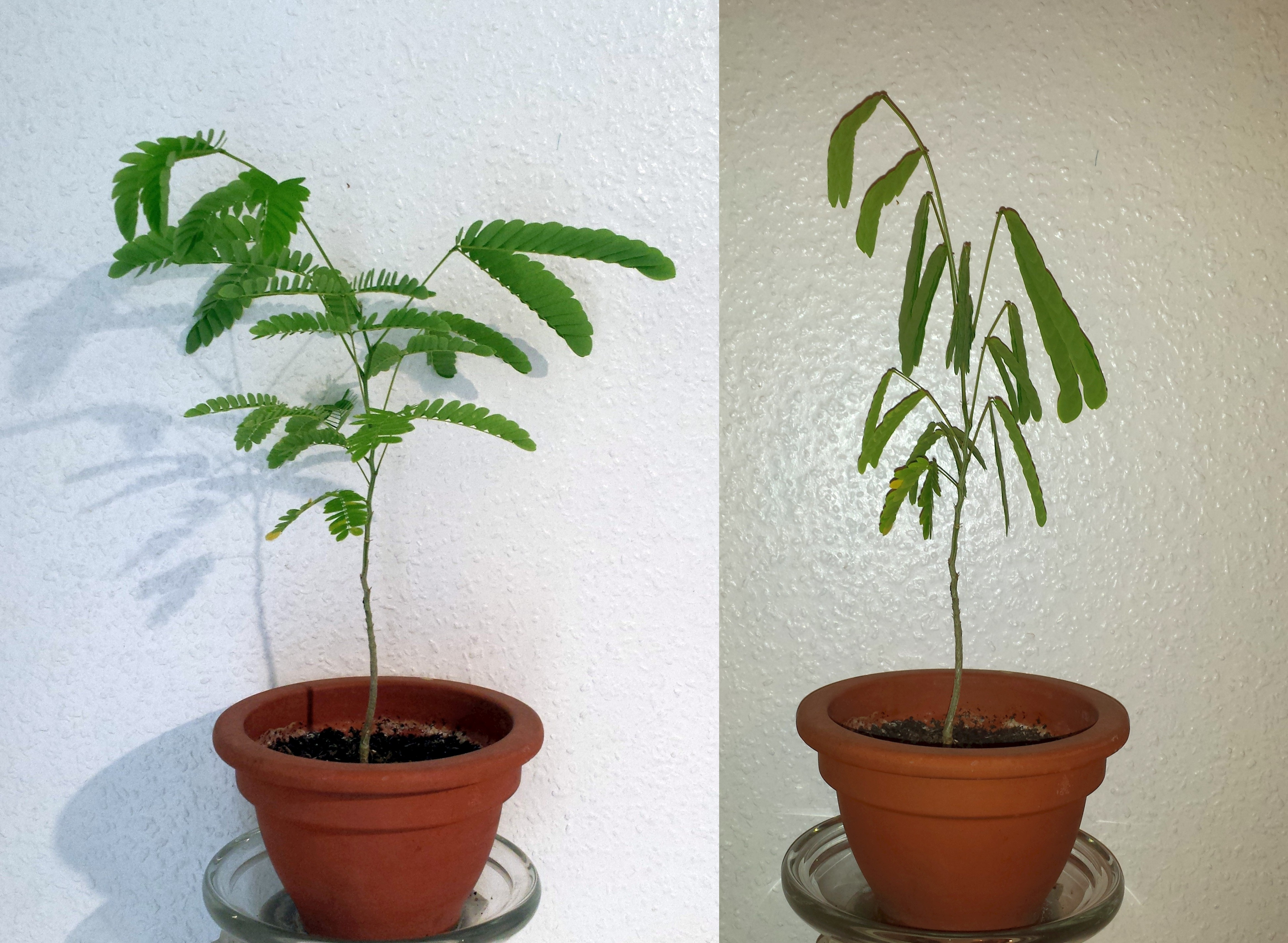 Jungpflanze des Seidenbaums (Schlafbaum) am Tag und in der Nacht Circadiane Rhythmik Circadian rhythm